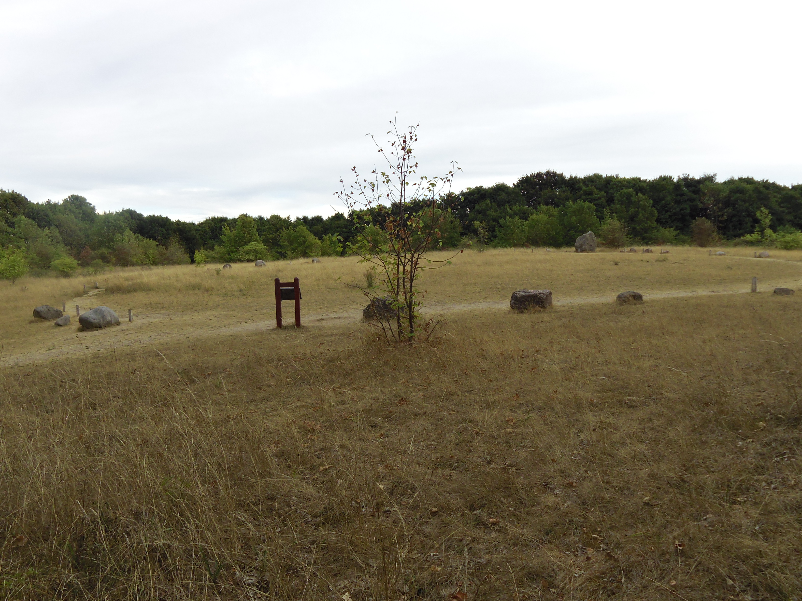 Kalvø Stenpark er en samling af "ledesten" fundet i diverse sønderjyske grusgrave. Disse "ledesten" består af karakteristiske stenarter der hver især stammer fra et bestemt område i Sydnorge, Sydsverige eller Bornholm og er altså ført til Sønderjylland under de sidste istider.